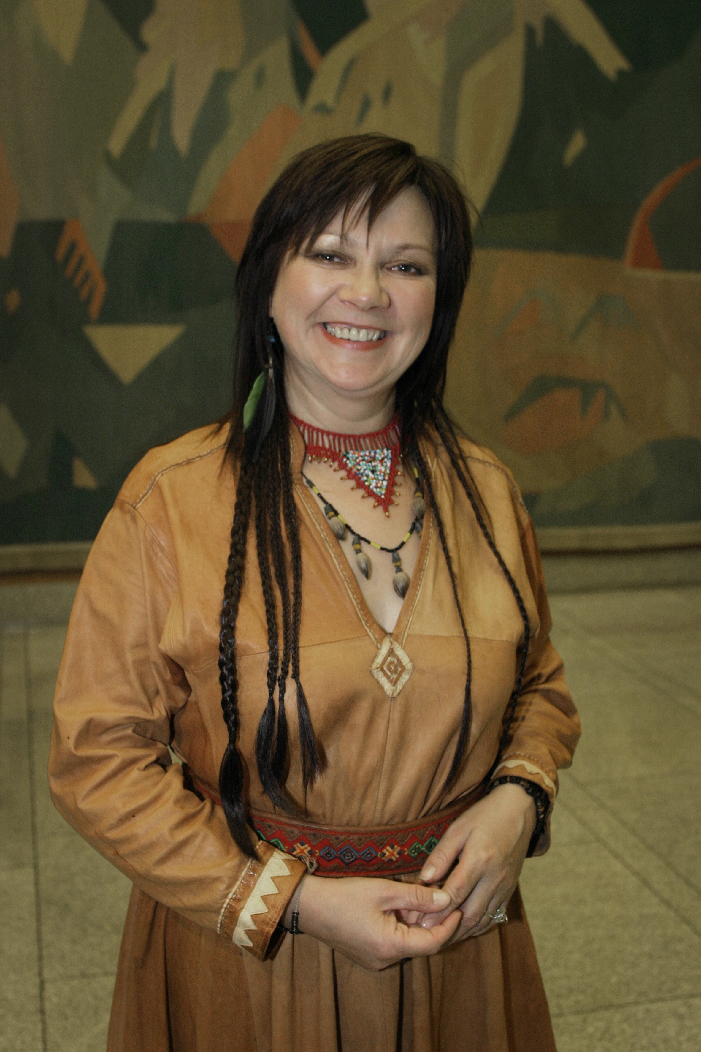 Mari Boine, Nordiska rådets musikpristagare (Bilden är tagen vid Nordiska rådets session i Oslo, 2003)